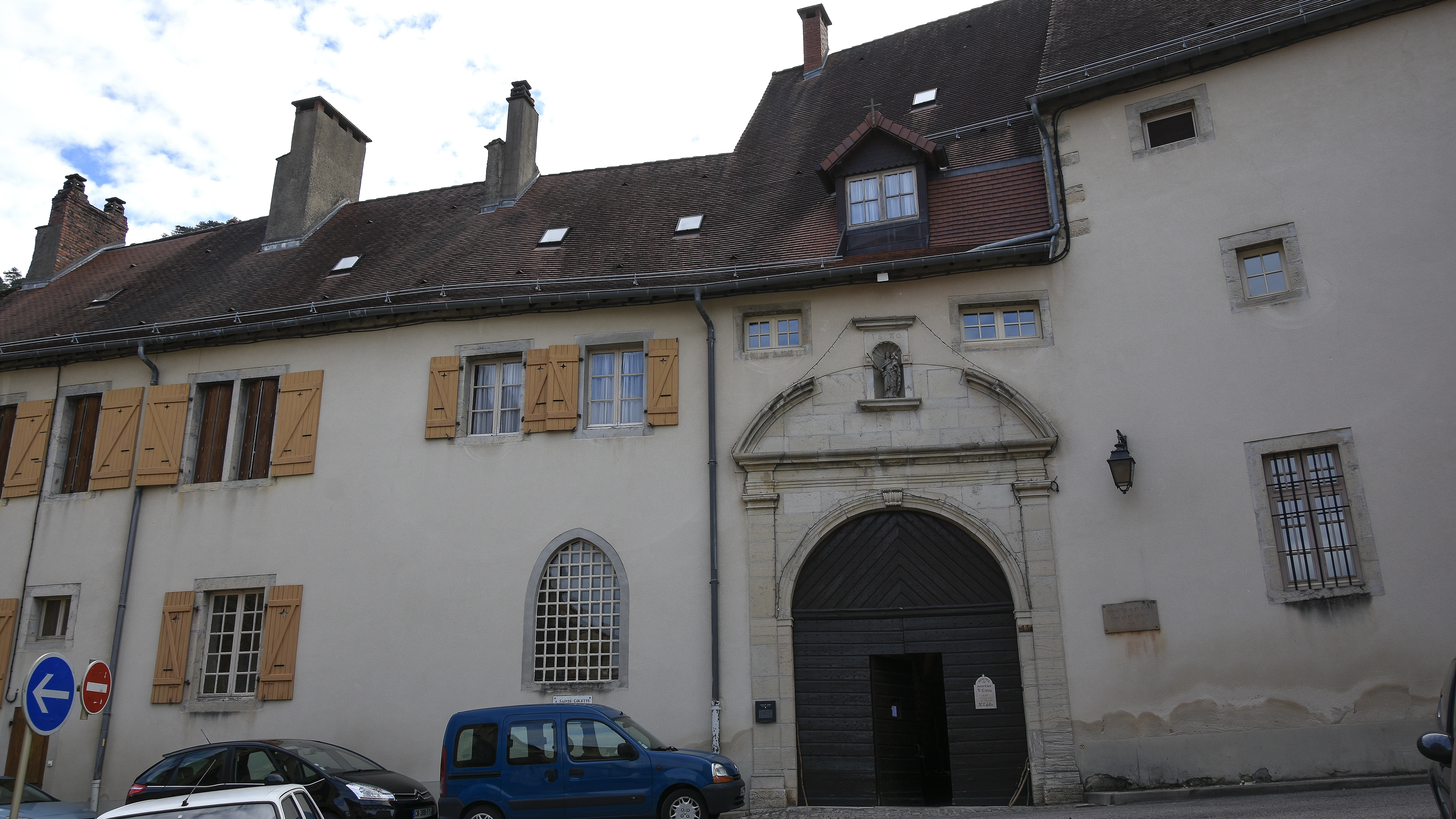 Sint-Claraklooster te Poligny, (Jura), Frankrijk